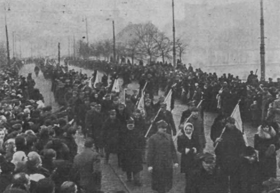 Pochód podczas pogrzebu Romana Dmowskiego, Warszawa 1939 r.